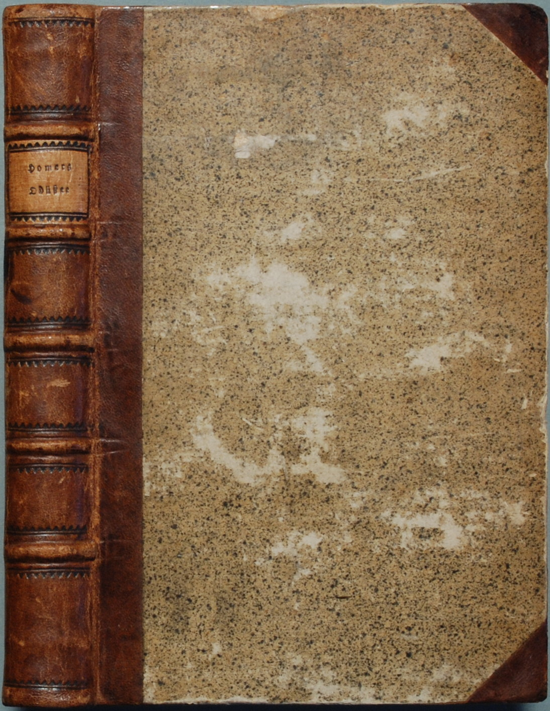 Zeitgnössischer Einband des obigen Erstdruckes (21 x 13,5 cm)